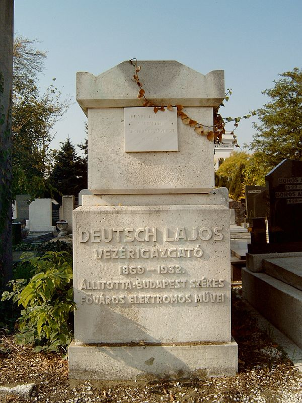 Deutsch Lajos (1869-1932) Budapest székesfőváros Elektromos Művei vezérigazgatójának sírja. Kozma utcai izraelita temető